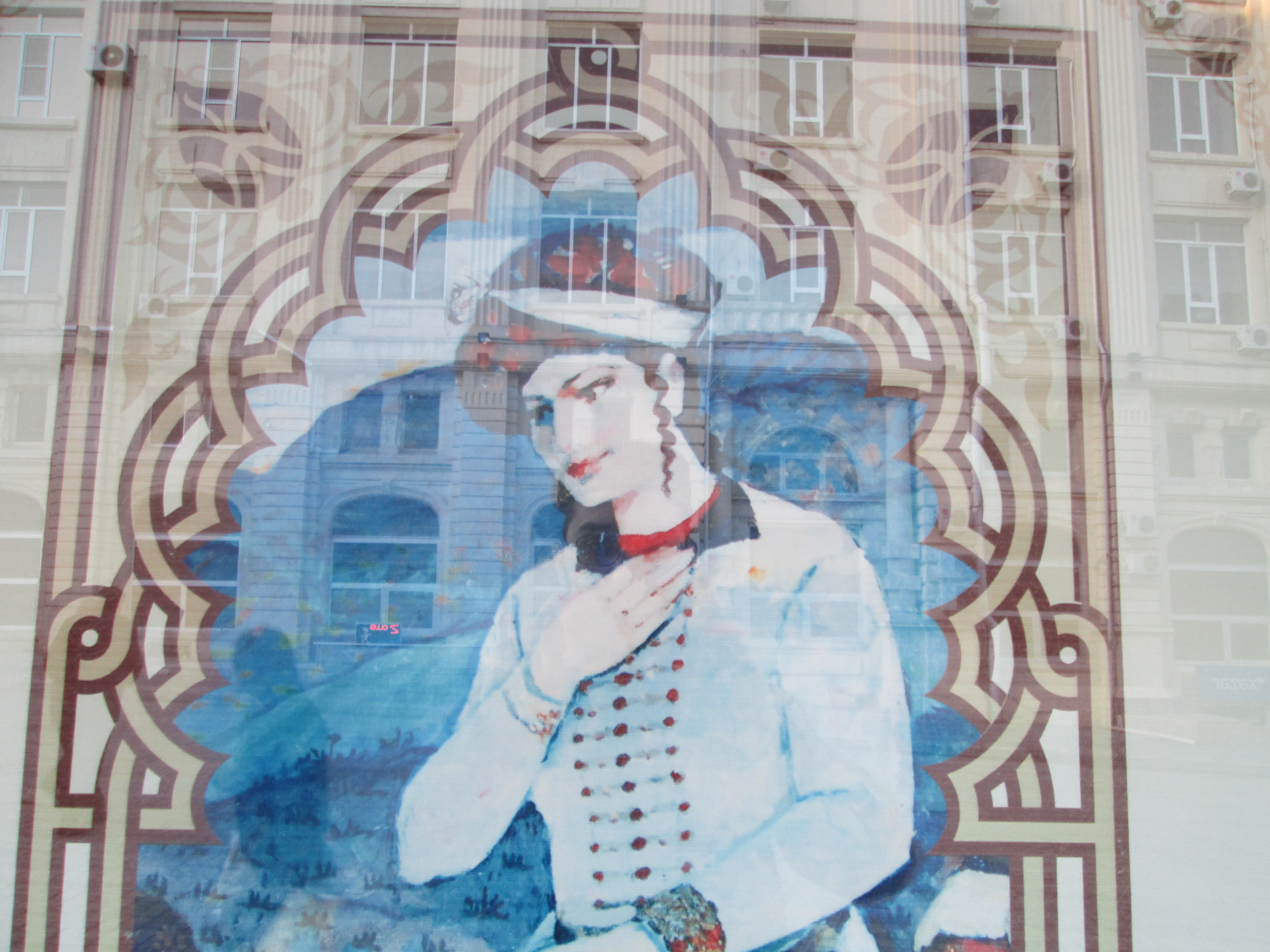 Nizami adına Ədəbiyyat Muzeyinin binasının pəncərəsində Rəziyyə Gəncəvi rəsmi